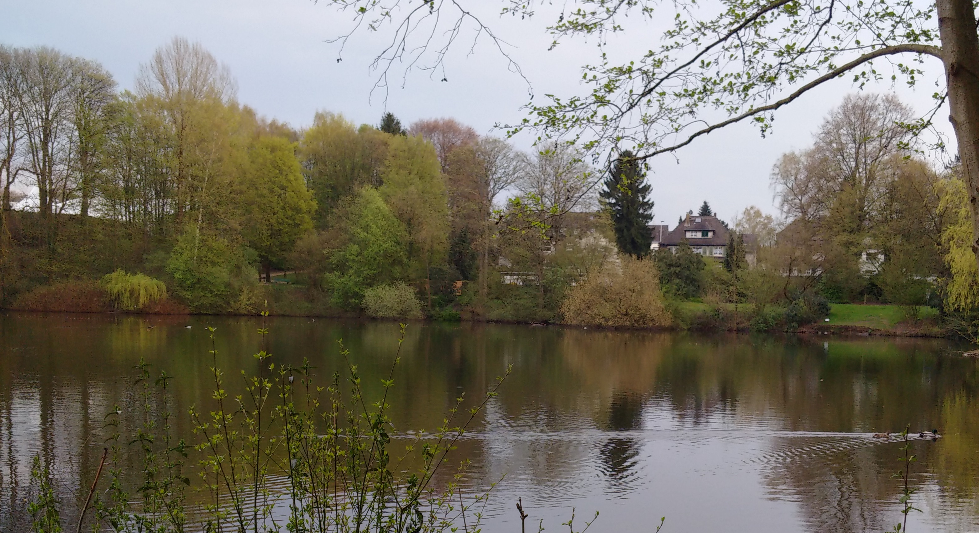 Stiehlsteich in Solingen-Ohligs, aufgenommen im Frühling 2016